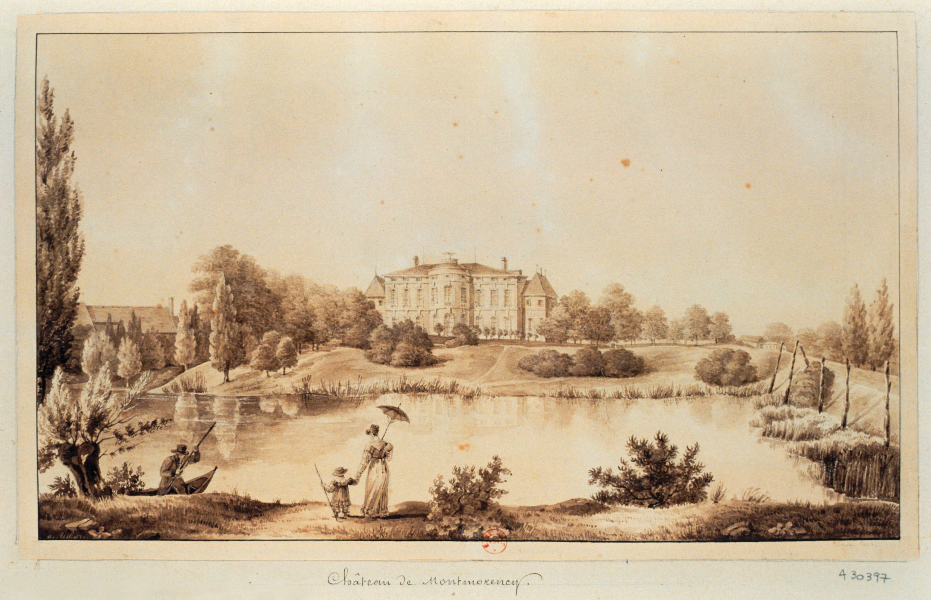 Château de Montmorency au 19e siècle. Notice n° : frBN100665720 Collectionneur : Destailleur, Hippolyte (1822-1893) Titre : Château de Montmorency Date d'édition : [19e siècle] Description : Dessin à la mine de plomb et lavis à l'encre brune, 17,3 x 29,2 cm Nom(s) géographique(s) : Montmorency, Val-d'Oise Sujet(s) : Château, Parc, Étangs Cote de l'original : BnF Est. Rés. Ve-26g-Fol. Cote : IFN-7740304